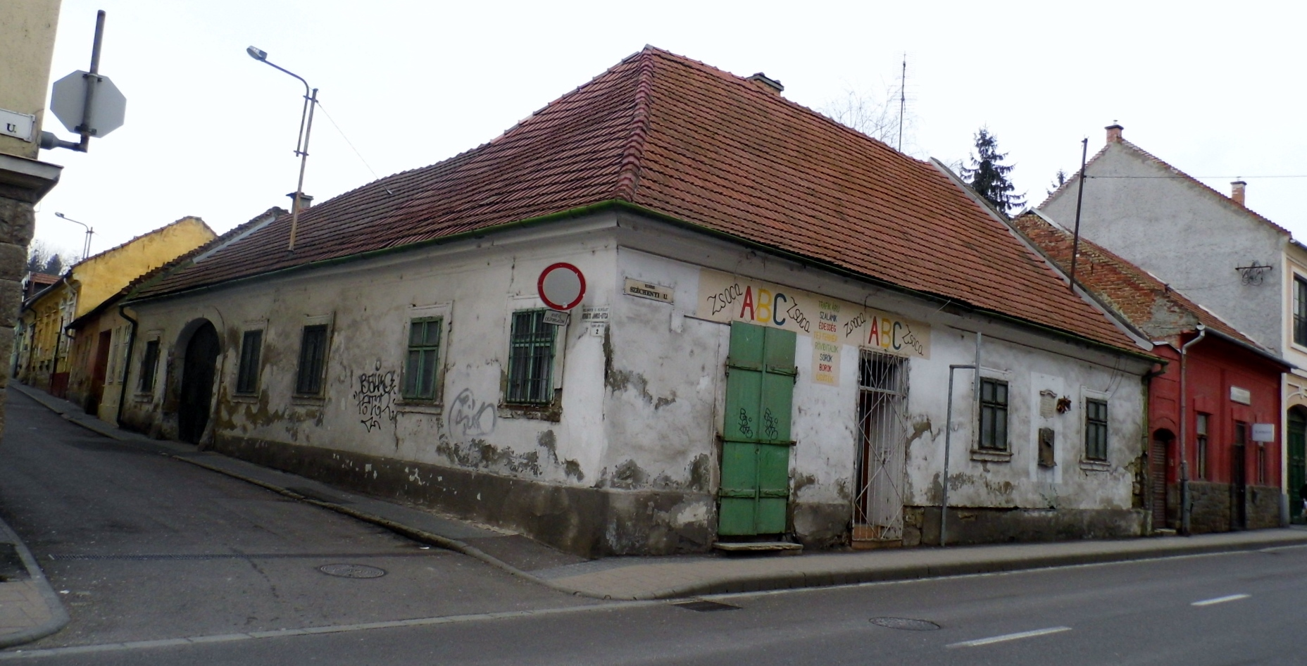 Lenkey János szülőháza, Kovács János - Széchenyi István út sarok, Eger This is a photo of a monument in Hungary, Identifier: 5547